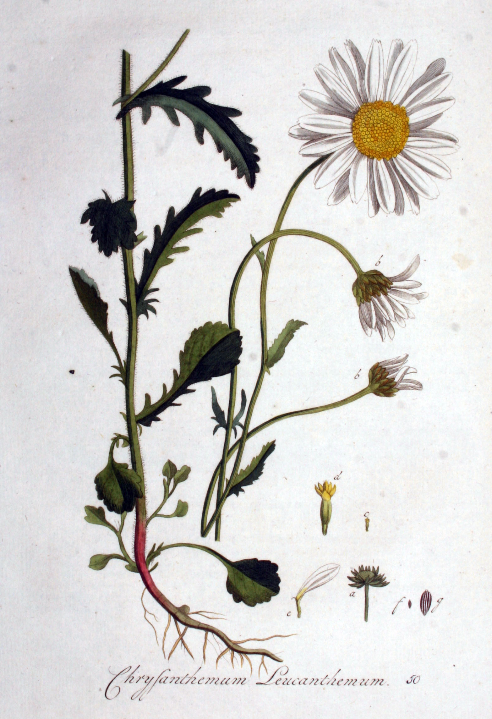 Leucanthemum vulgare Lam. (Syn. Chrysanthemum leucanthemum L.)